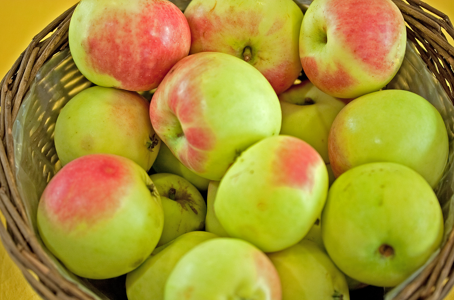 Der Bittenfelder ist eine Apfelsorte